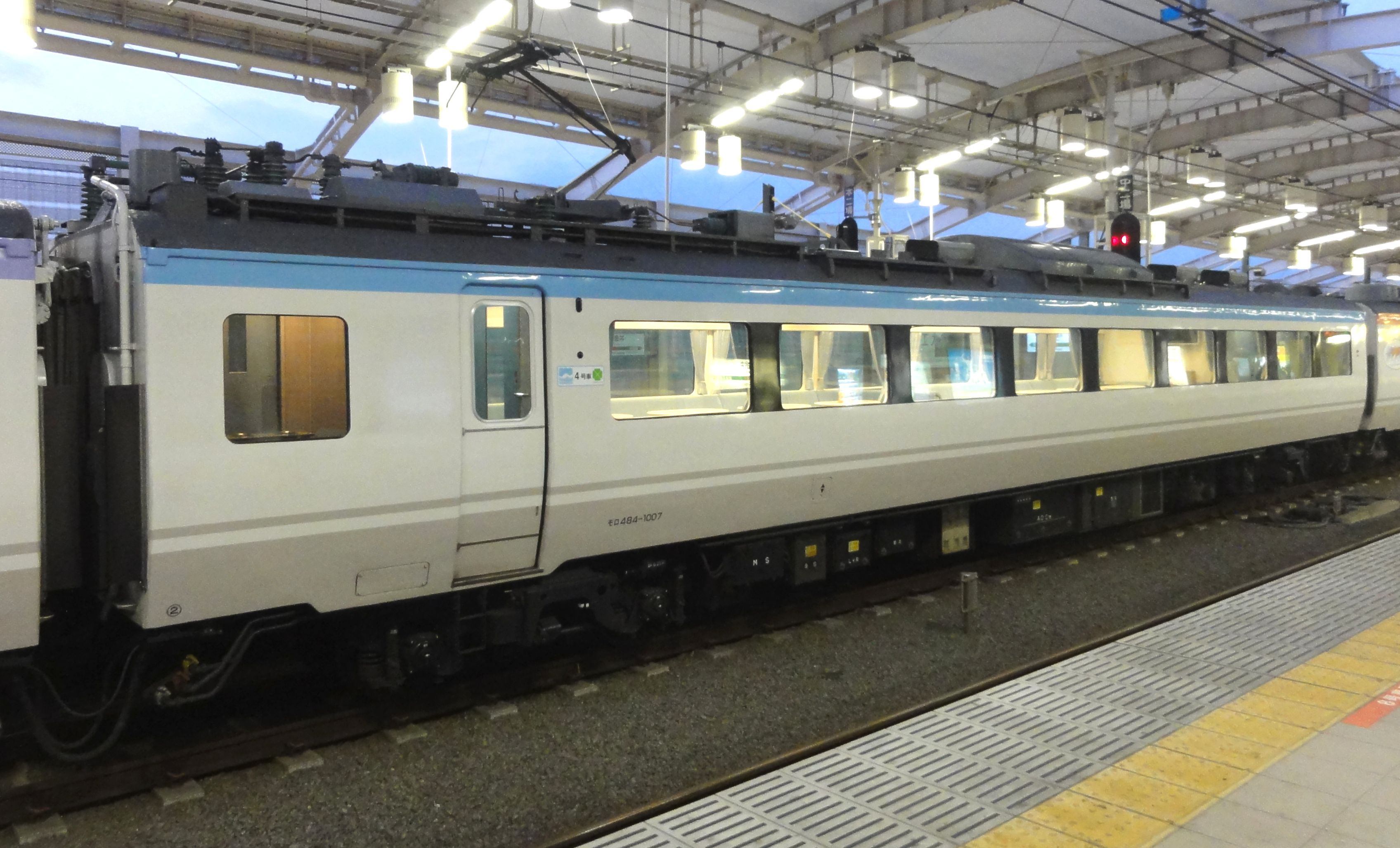 JR東日本 485系「彩（いろどり）」